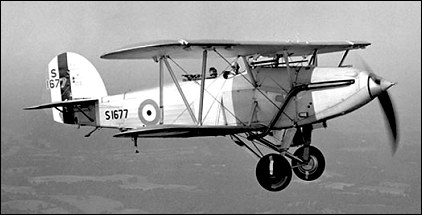 Der britische Marine-Aufklärer Hawker Osprey